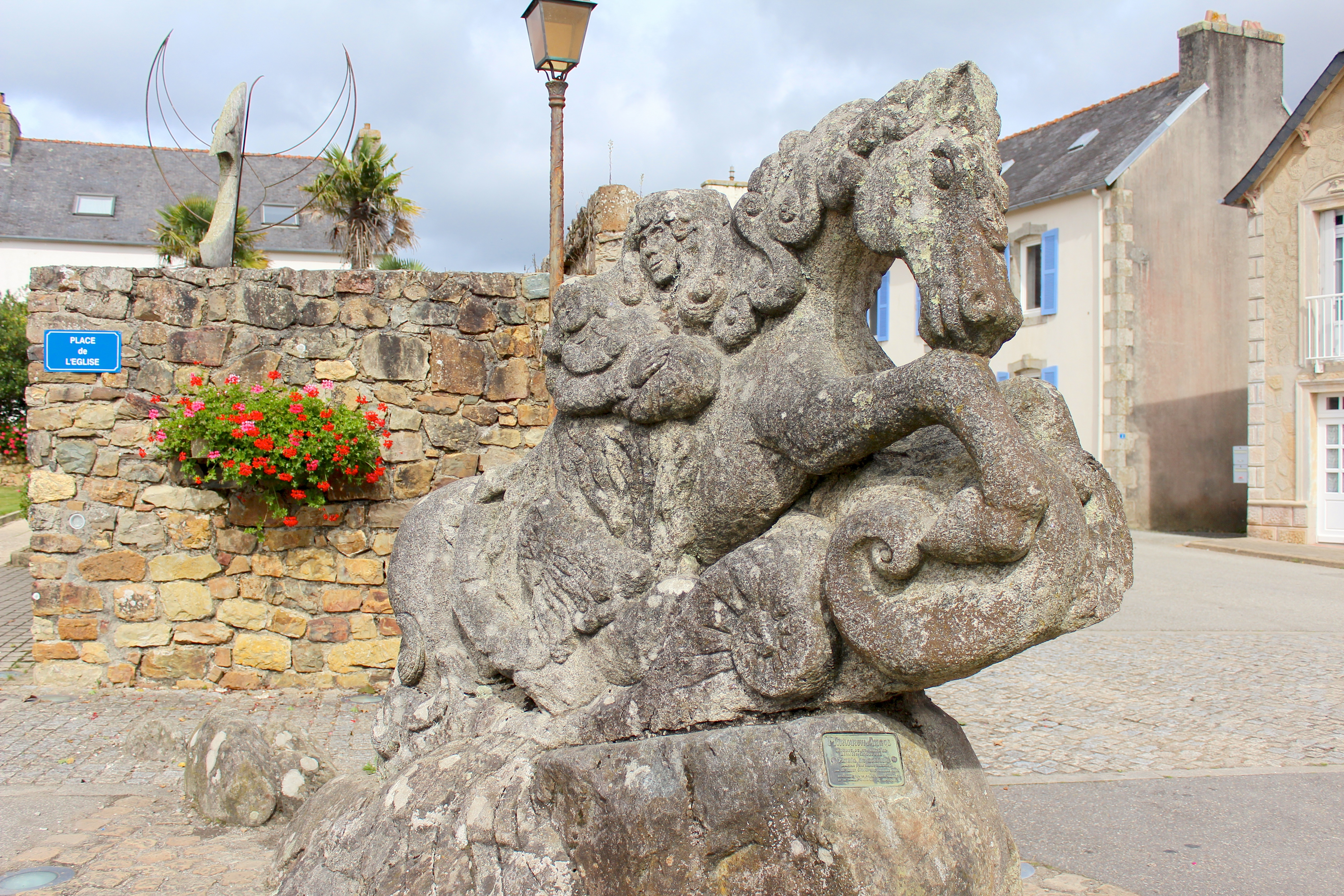 Statue du Roi Gradlon place de l'Eglise